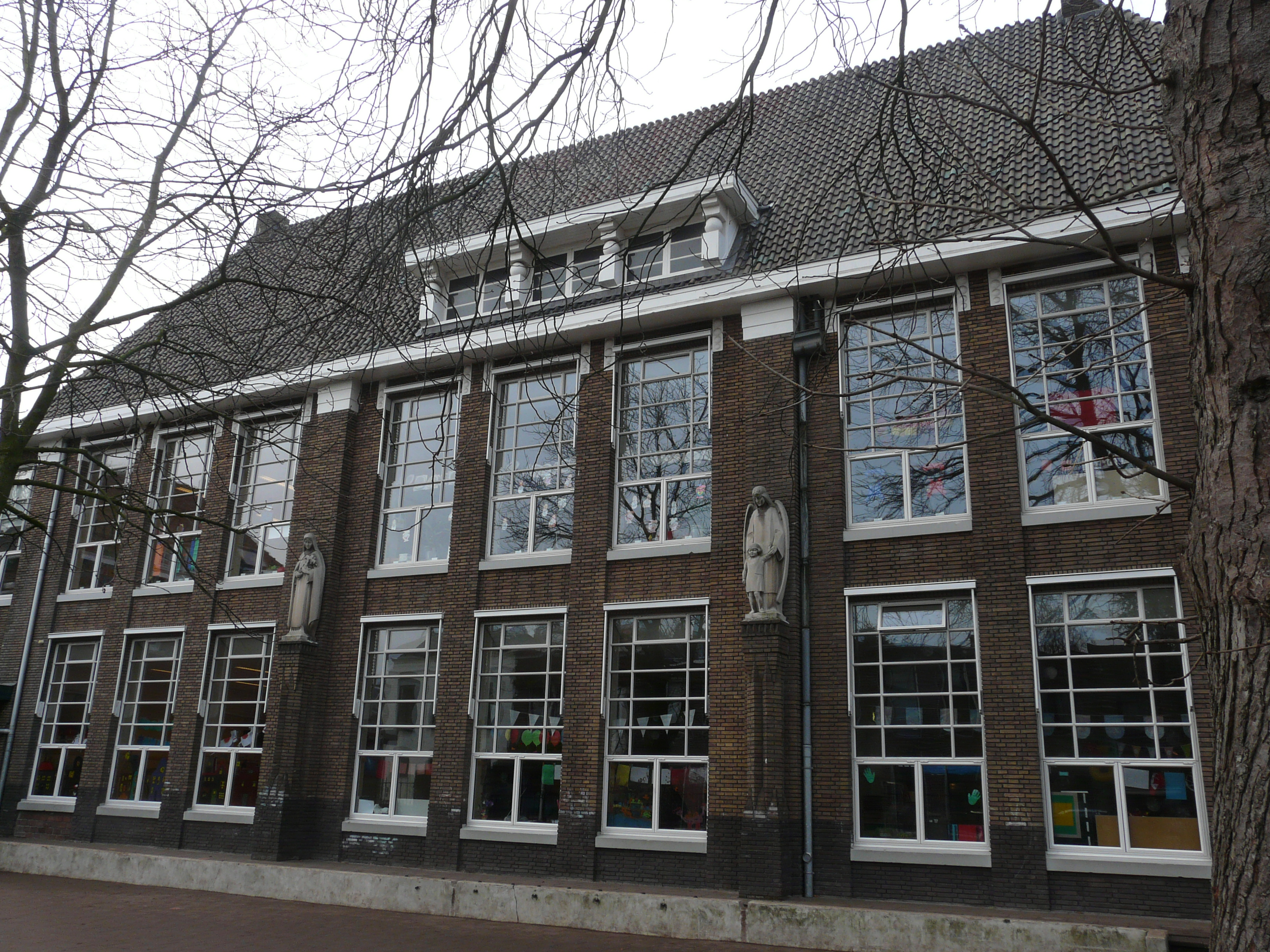 Zicht op een deel van de KBs St. Josephschool in de St. Josephstraat 7 in Breda Centrum in Breda